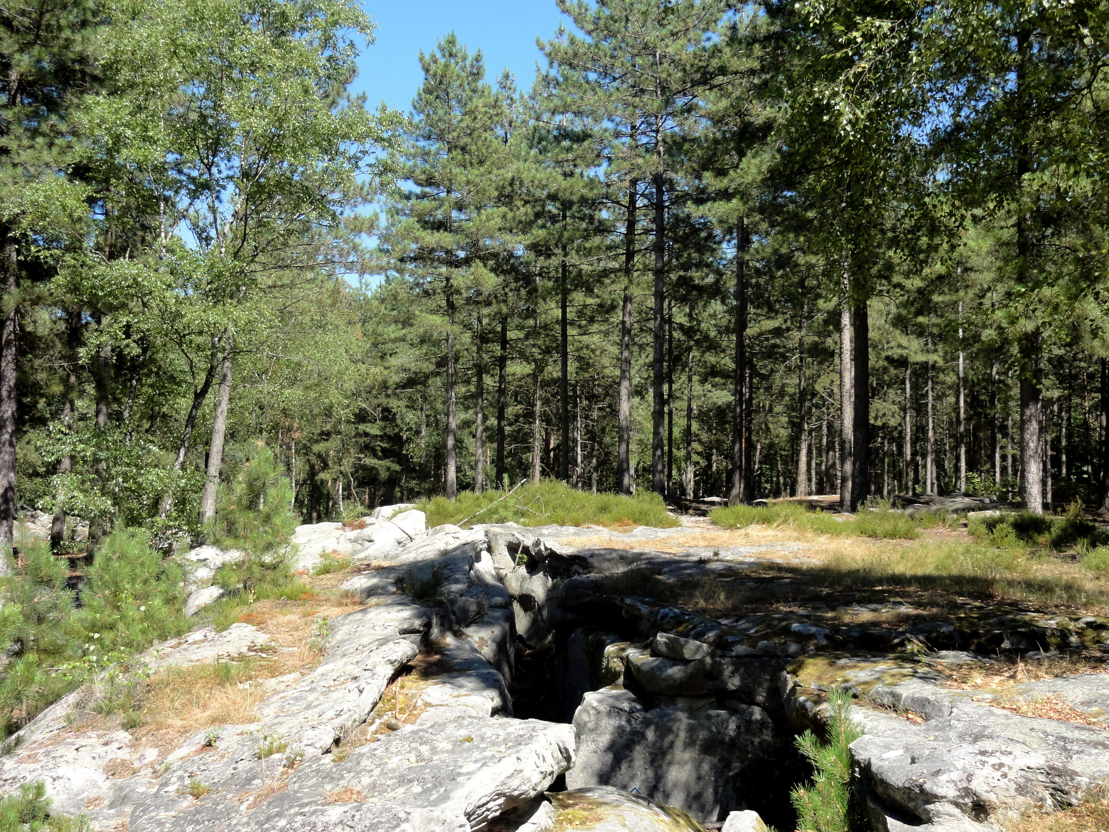 Près de la cave du diable, au sud de Vaumoise.